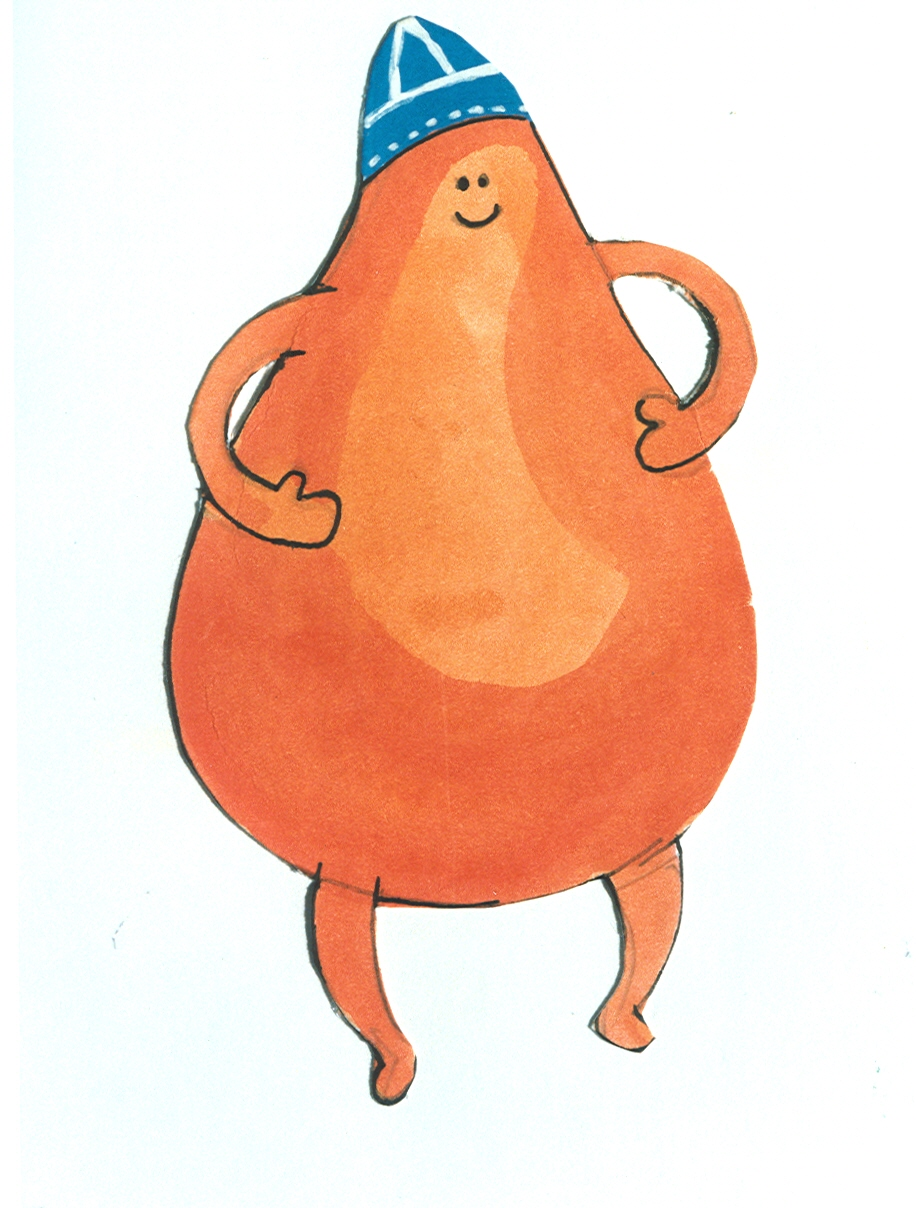 בלי סודות הייתה תוכנית טלוויזיה לימודית, אשר שודרה בטלוויזיה החינוכית הישראלית באמצע שנות השמונים, בהמשך בגלל הפופולריות הגדולה נוצרה תוכנית המשך, "בסוד העניינים", אשר הופקה בשנים 1991-1992.